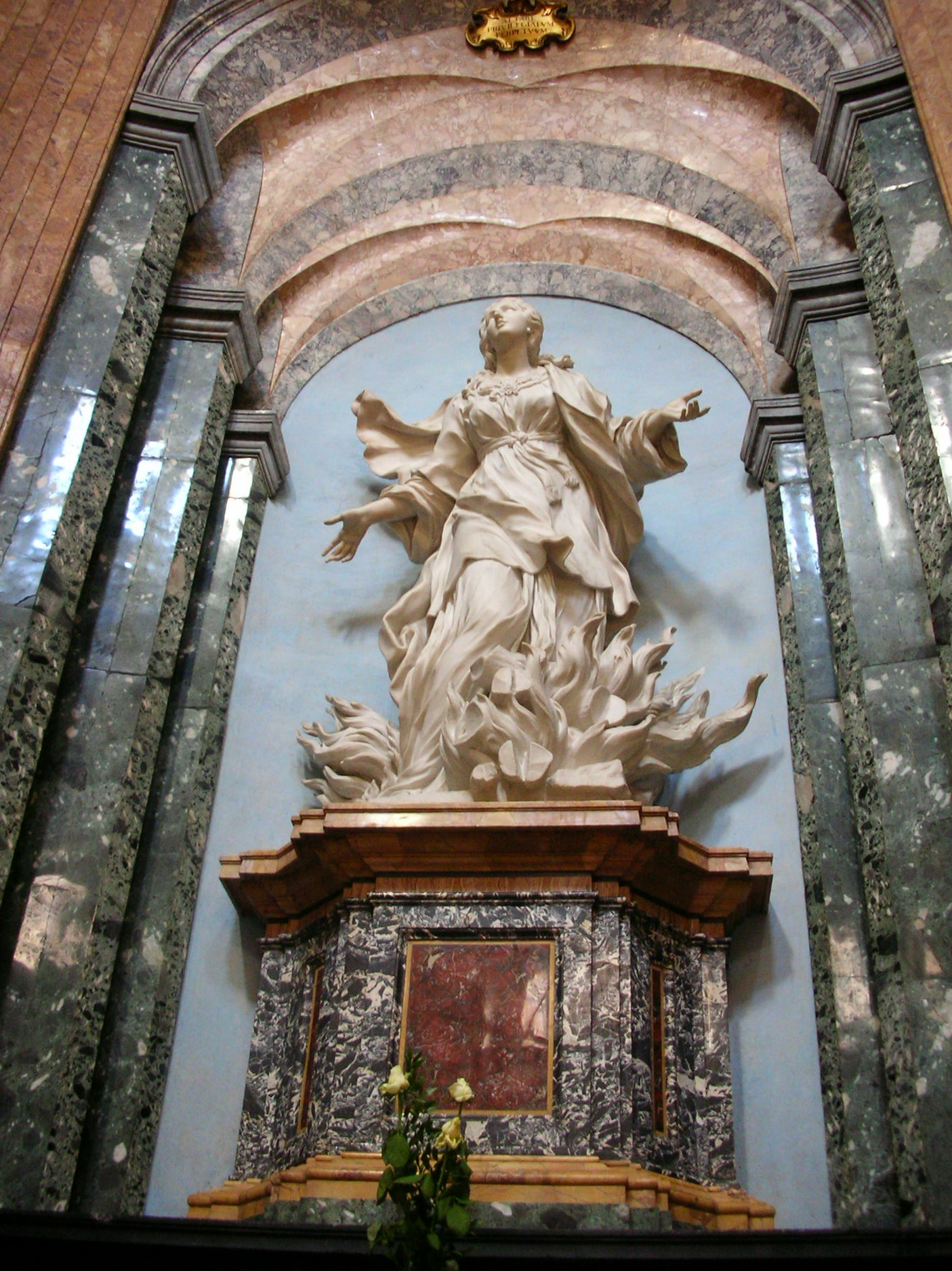 "S.Agnese tra le fiamme" di Ercole Ferrata, Sant'Agnese in Agone, Rome